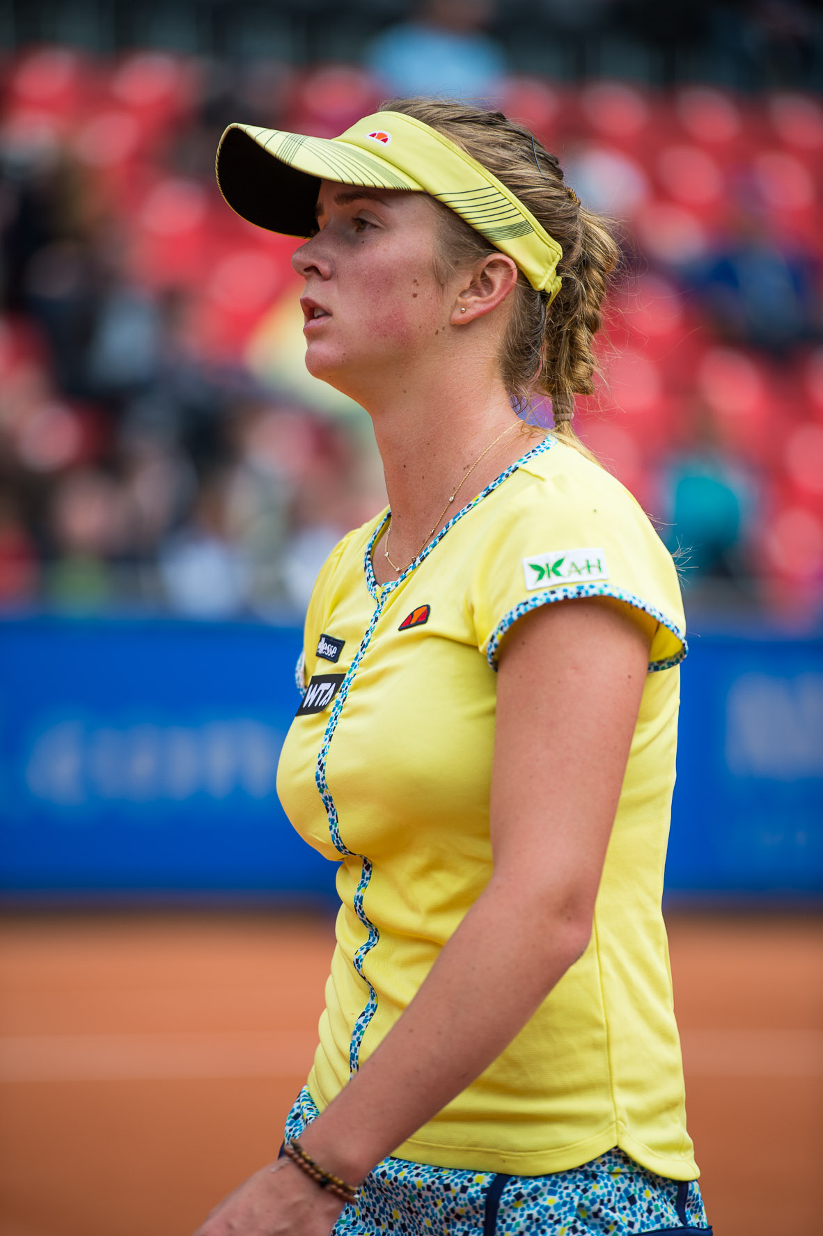 Damentennis,Elina Svitolina,Elina Switolina,Nürnberger Versicherungscup 2014,Tennis,WTA